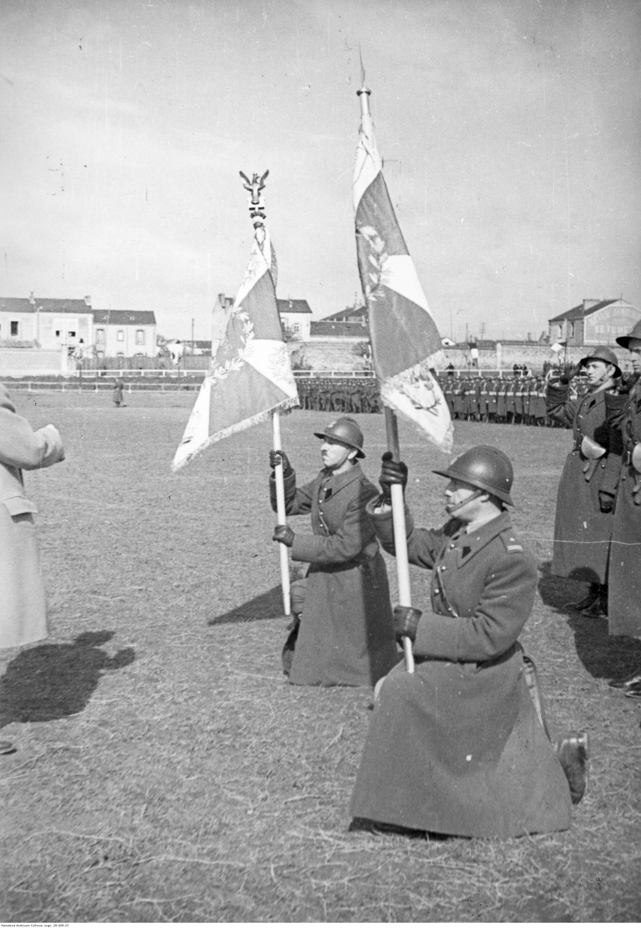 Uroczystość wręczenia sztandarów oddziałom saperów polskich we Francji - Anger, 30 marzec 1940 r. Wręczone sztandary trzymają: mjr Kazimierz Łukasiewicz i mjr Teodor Rzewuski. Archiwum Fotograficzne Czesława Datki. Sygnatura: 18-255-27